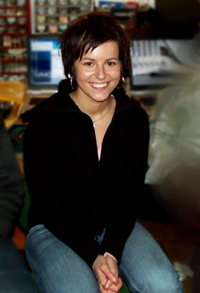 Katarína Knechtová, Slovak singer